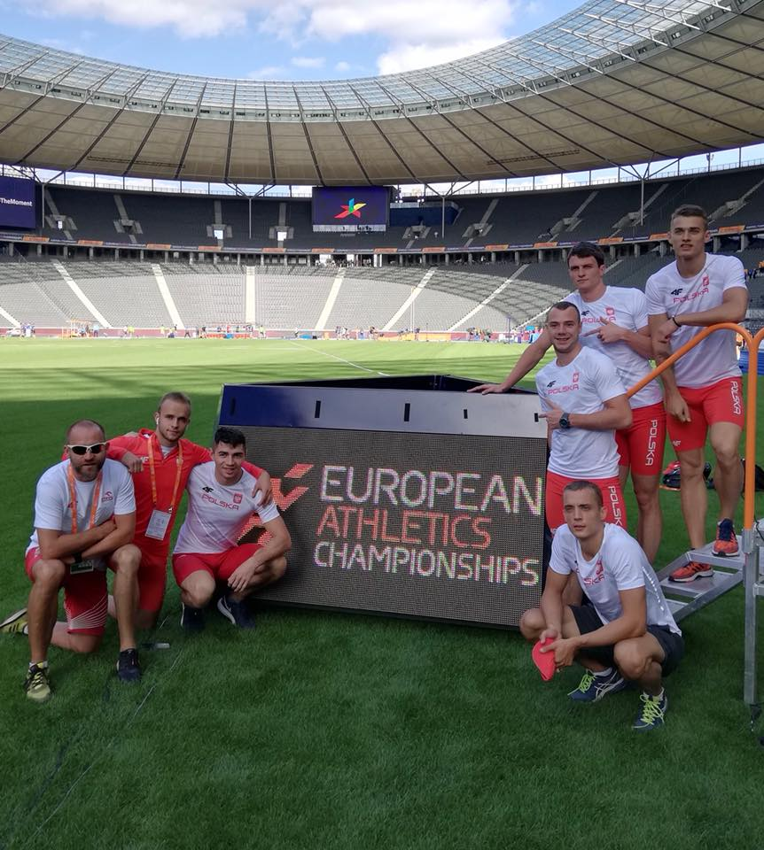 Sztafeta 4 x 100 metrów Reprezentacji Polski